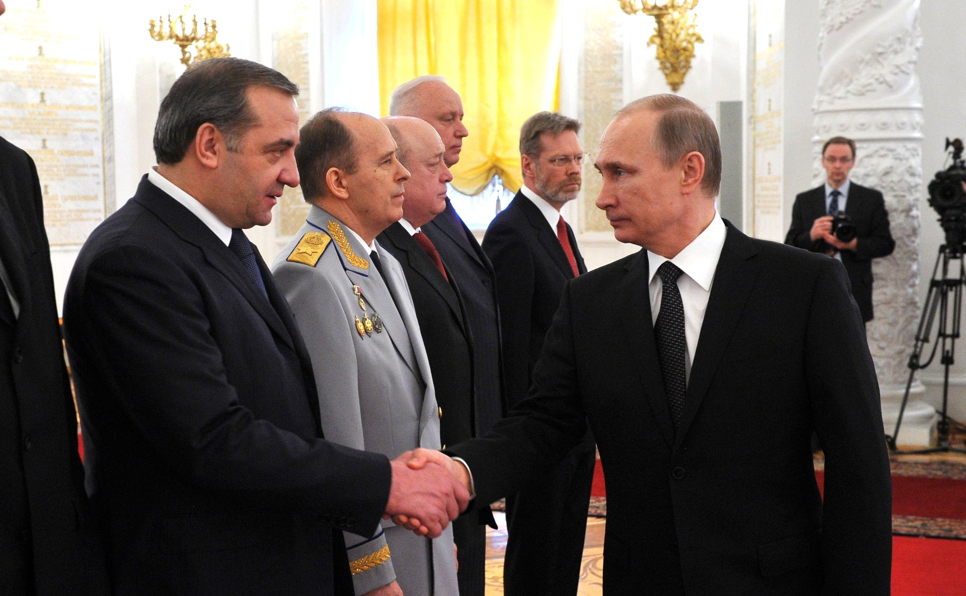 Слева направо: Министр по делам гражданской обороны, чрезвычайным ситуациям и ликвидации последствий стихийных бедствий Владимир Пучков, директор Федеральной службы безопасности Александр Бортников, директор внешней разведки Михаил Фрадков, председатель Следственного комитета Александр Бастрыкин и представитель президента в Высшей квалификационной коллегии судей Антон Федоров